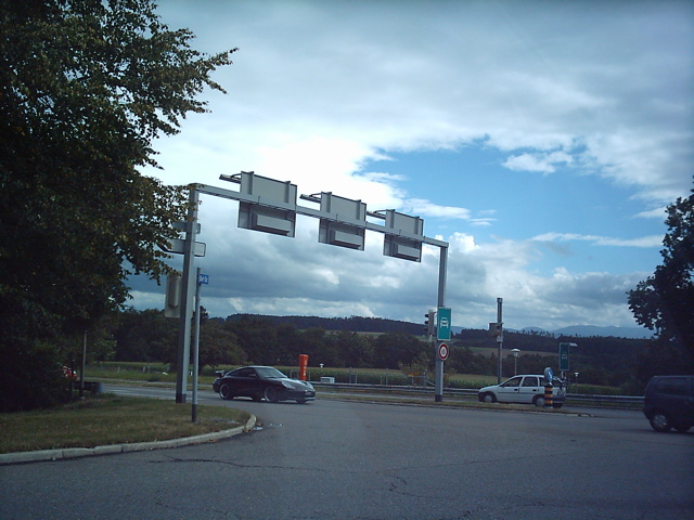 A52 in Zumikon. DF08 image.